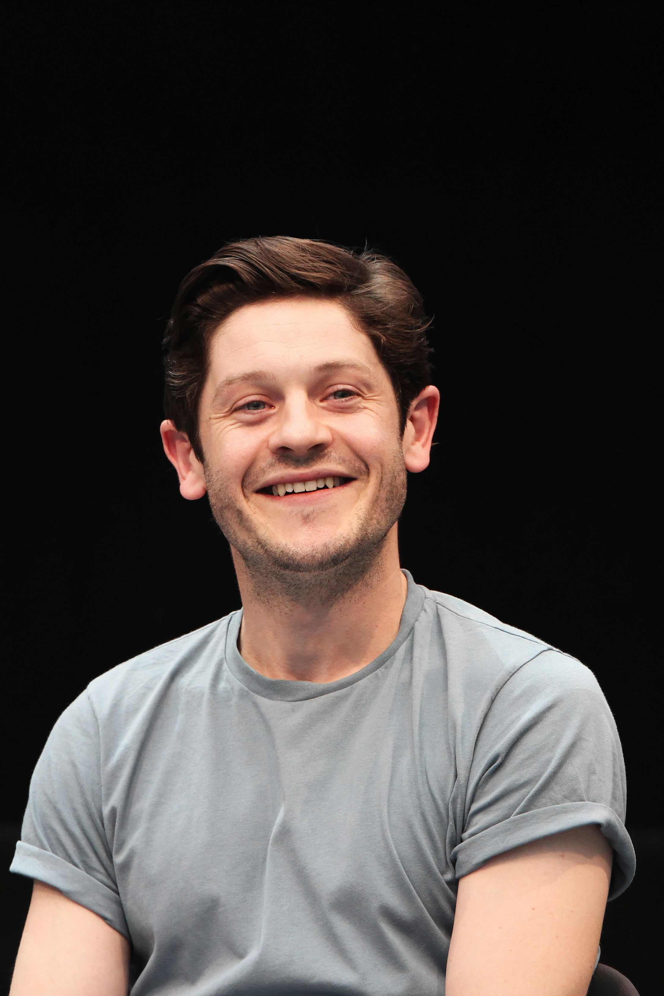 Bilder von der Comic Con Germany 2019 in Stuttgart